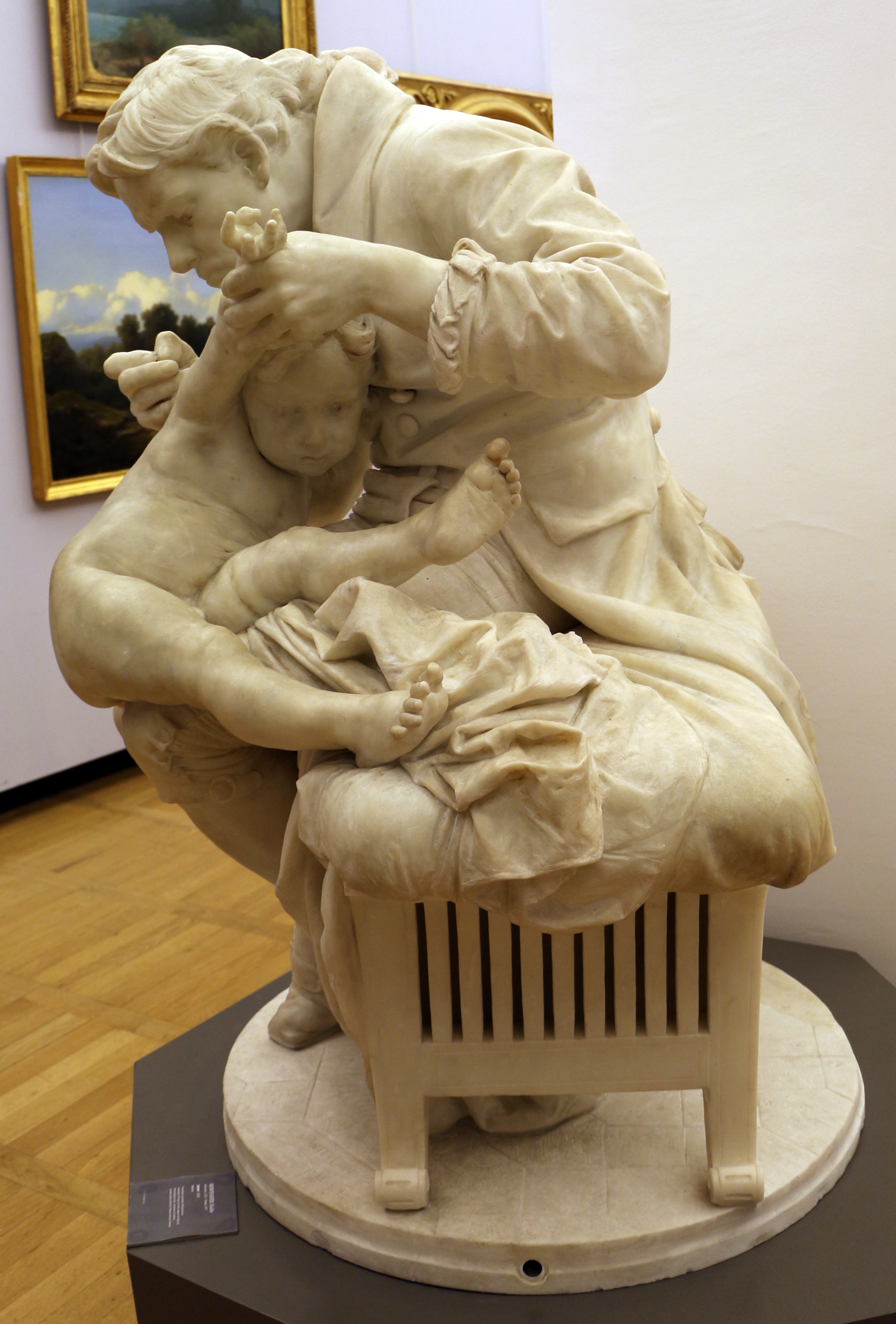 Il parco e i musei di Nervi This is a photo of a monument which is part of cultural heritage of Italy.